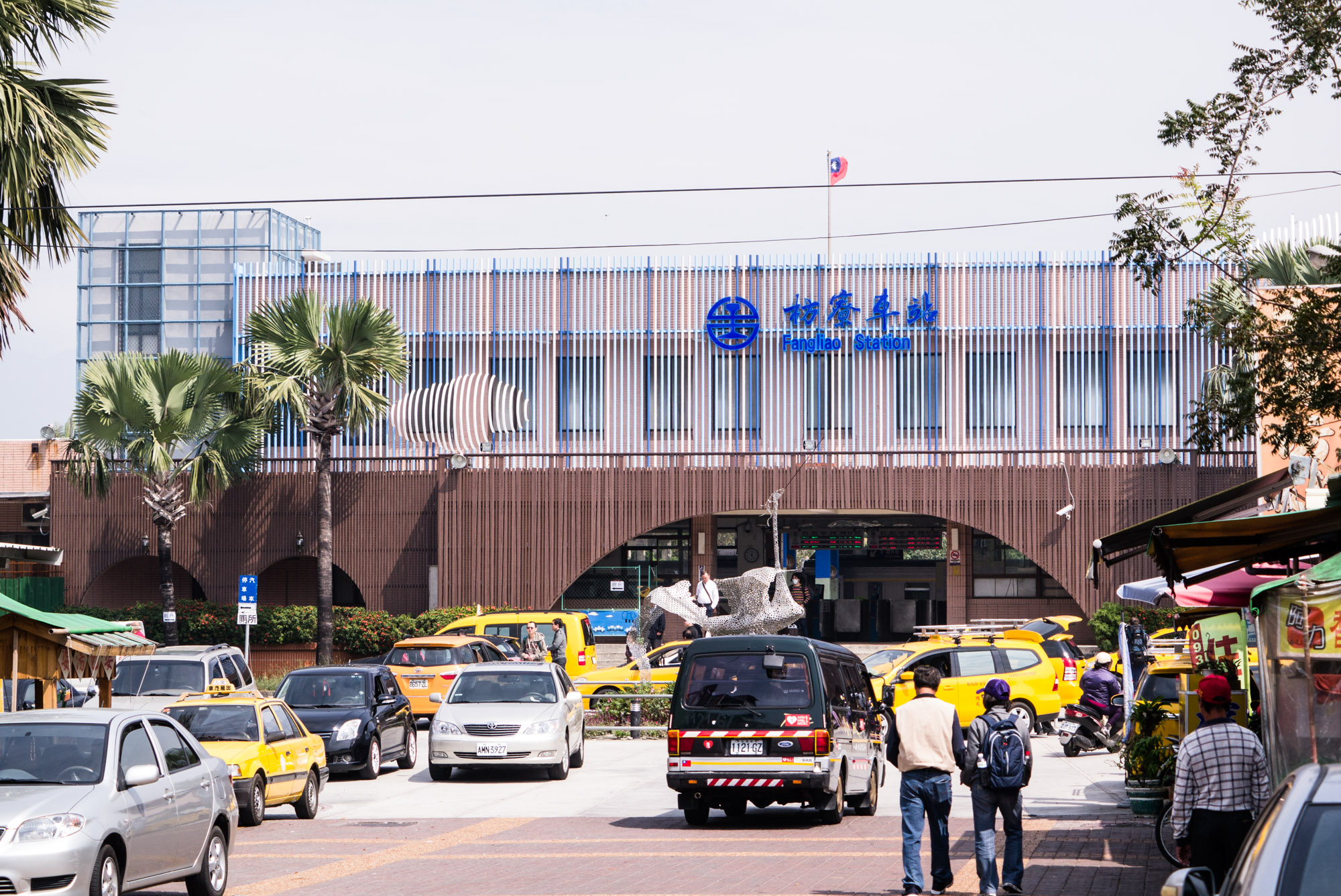 枋寮車站2016年2月改建完成之站體